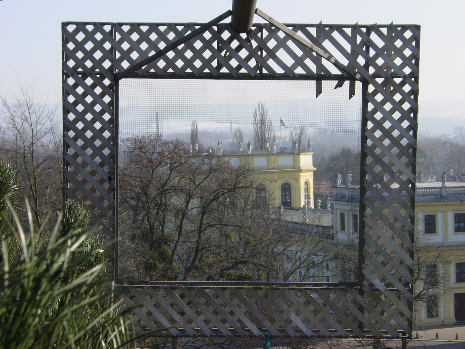 Auefenster Haus-Rucker.Co, Documenta 6 1977, Friedrichsplatz in Kassel, Germany.